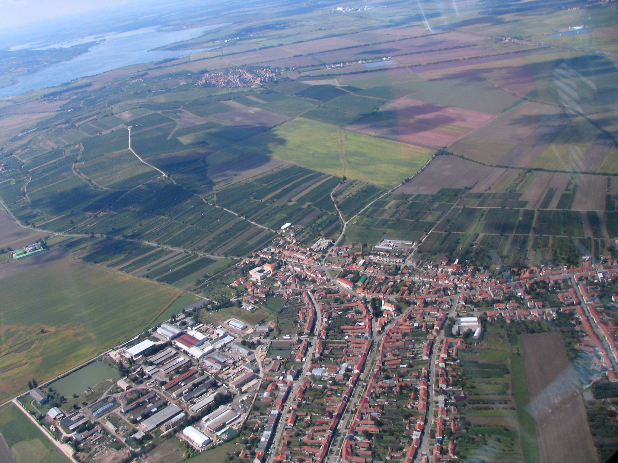 Pohled z větroně